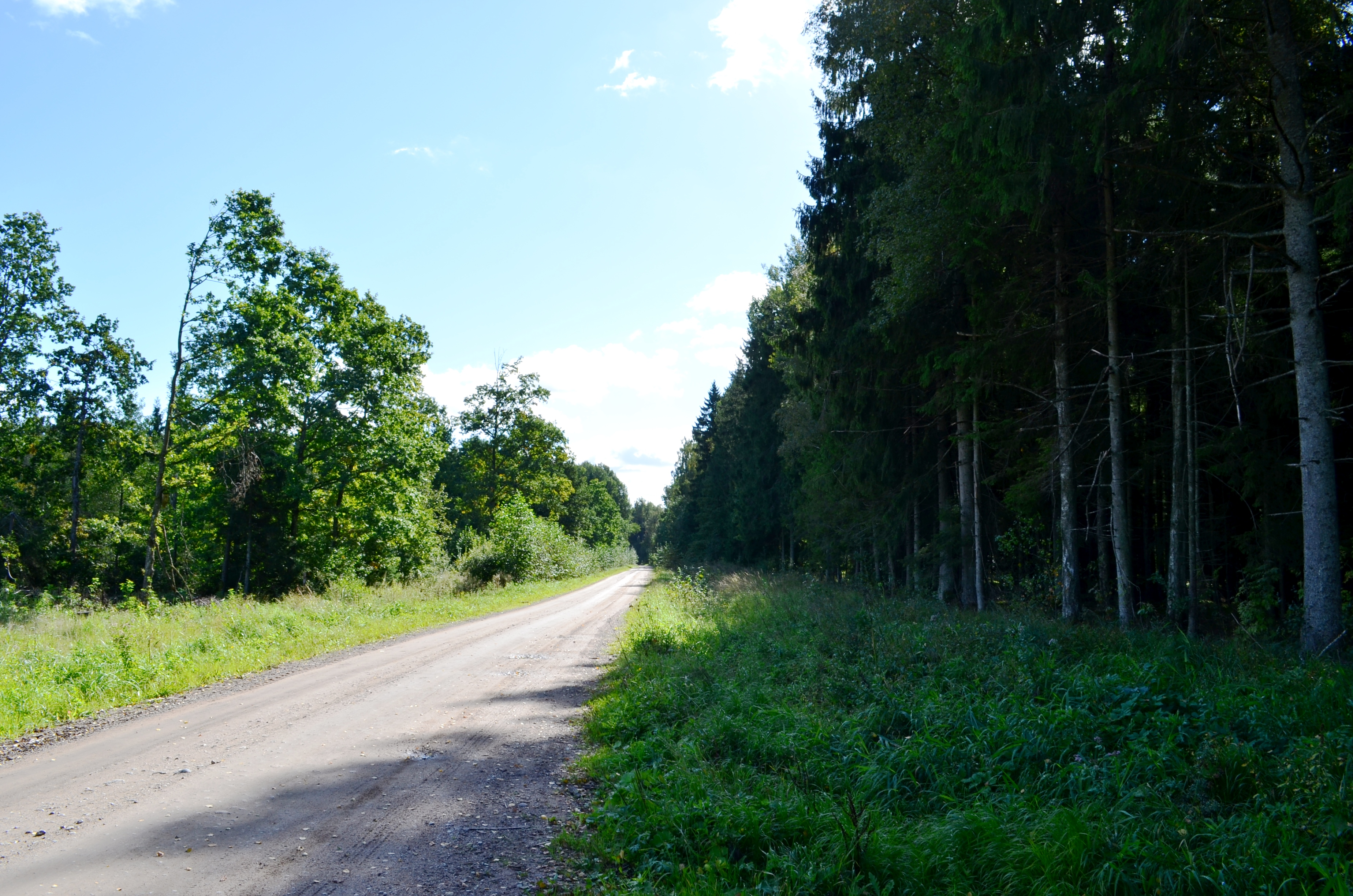 Žemaitėška: Vainota medė pri Dargėškės, Šėlotės rajuons